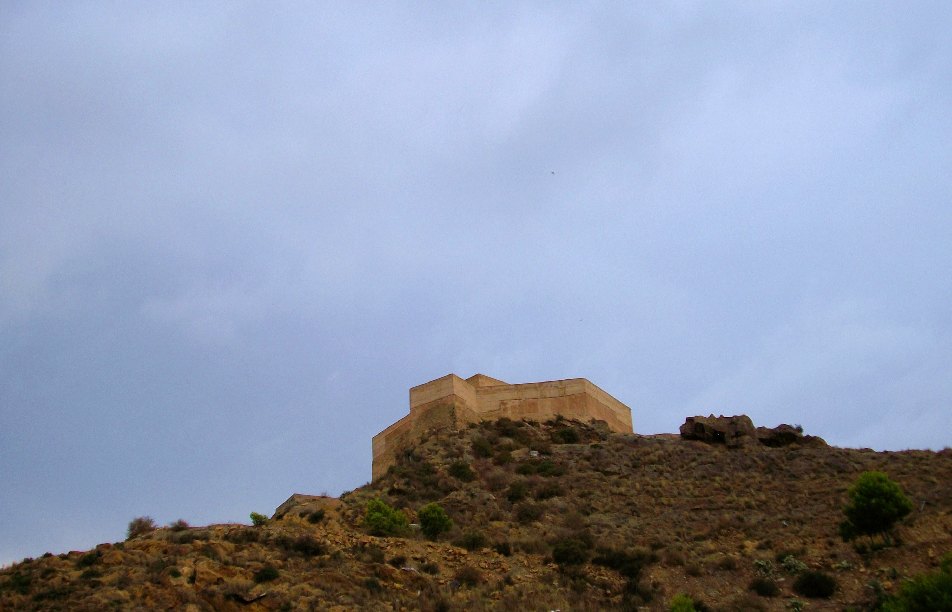 Castell de Coix, Baix Segura.